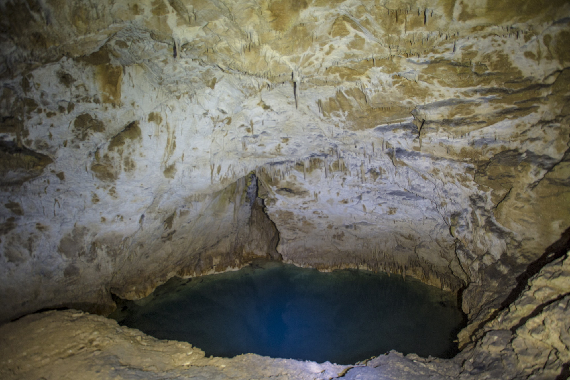 მოთენას მღვიმის ბუნების ძეგლი ღირსშესანიშნაობა: ბუნების ძეგლი წარმოადგენს ასხის მასივზე, ტაბაკელას ქედის ჩრდილო-დასავლეთს ფერდობზე, მდინარე აბაშის ხეობის მარცხენა მხარეს ეოცენური ასაკის შრეებრივ კირქვებში გამომუშავებულ ორსართულიან მღვიმეს, სადაც გაედინება მუდმივმოქმედი ნაკადი, რომელიც მდ. აბაშას უერთება. მისი წინა ნაწილი ჩამონგრეულია და ღია ხეობას წარმოადგენს. აქვე ამოყვანილია ქვითკირის კედელი, დატანილია სათოფურები. მღვიმე ორი დიდი დარბაზისაგან შედგება, რომლებიც ერთმანეთს ვიწრო, მაგრამ მაღალი გასასვლელებით უკავშირდებიან. ბოლო დარბაზის სამხრეთ-აღმოსავლეთ კუთხეში 10 მ საფეხურია, რომლითაც მღვიმის მეორე სართულზე შეიძლება მოხვედრა. აქ მრავლადა: სტალაქტიტები, სტალაგმიტები, ტრავერტის კასკადები, გურები, ფარდები, ასევე დიდი ზომის ლოდები, გამოფიტვის ადგილობრივი მასალა. მღვიმეში ბინადრობენ ობობები და სხვა მწერები. ისტორიული ნაგებობა შუა საუკუნეებში გამოყენებული იყო ციხე-სიმაგრედ. მდებარეობა: მარტვილის მუნიციპალიტეტი, სოფ. პირველი ბალდის მიდამოები, 473 მეტრი ზღვის დონიდან. კოორდინატები: N42 28.595 E42 23.470